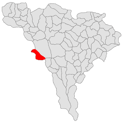 Categorie:Hărţi ale judeţului Alba